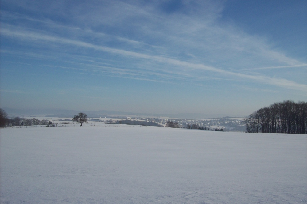 Amselhof am Lotterberg zwischen Wolfershausen und Deute in Nordhessen, Deutschland